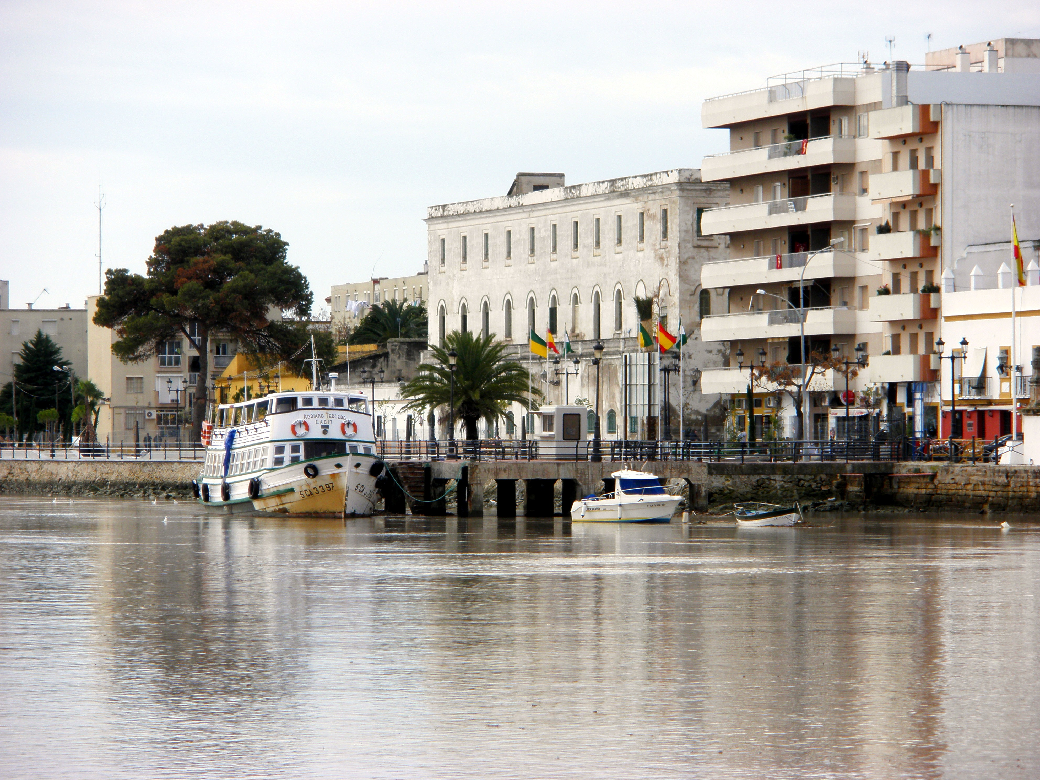 Vaporcito de El Puerto